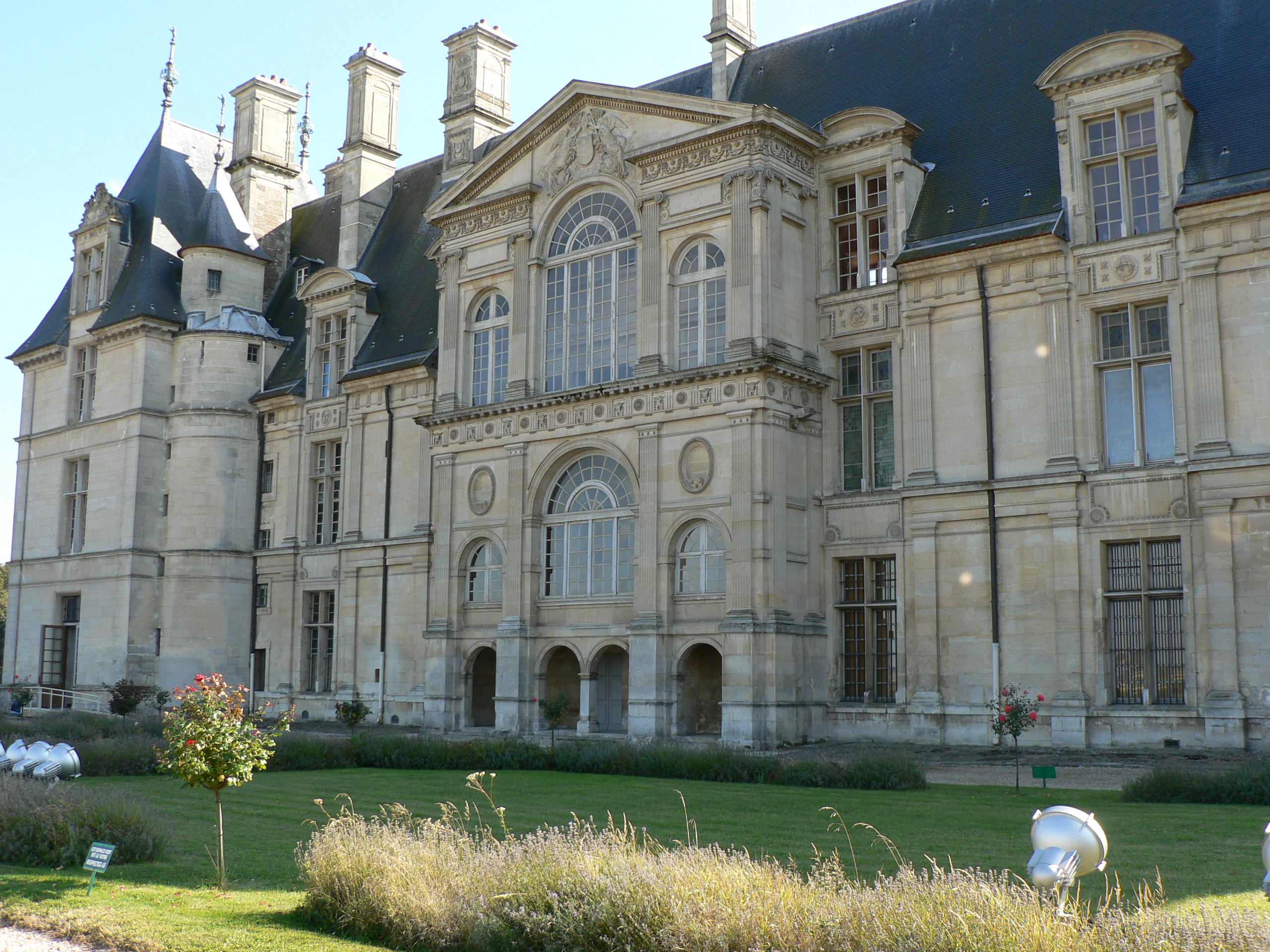 Façade septentrionale du Château d'Ecouen dans le Val d'Oise.